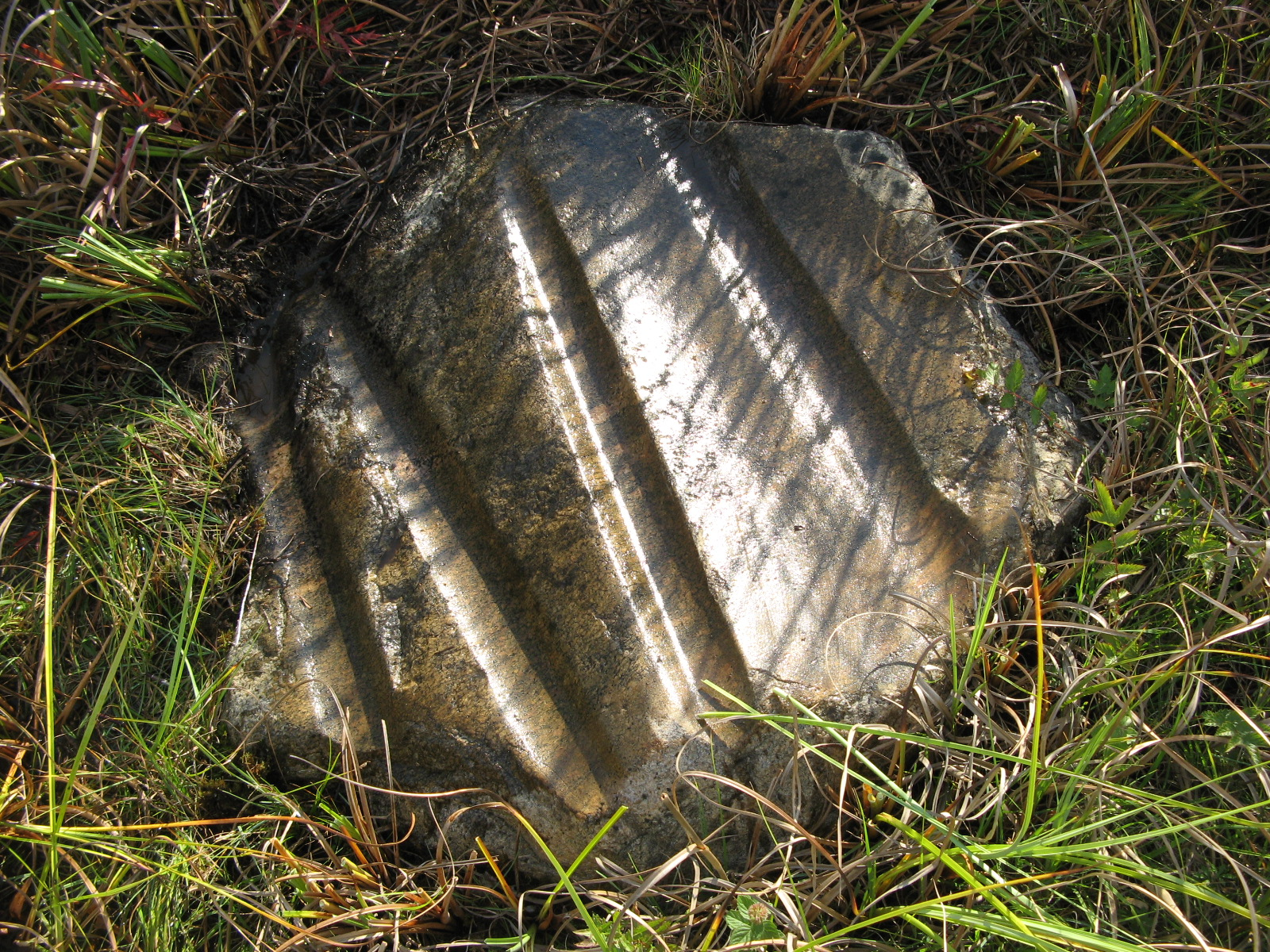 Slipskåresten i Fardume träsk, Gotland